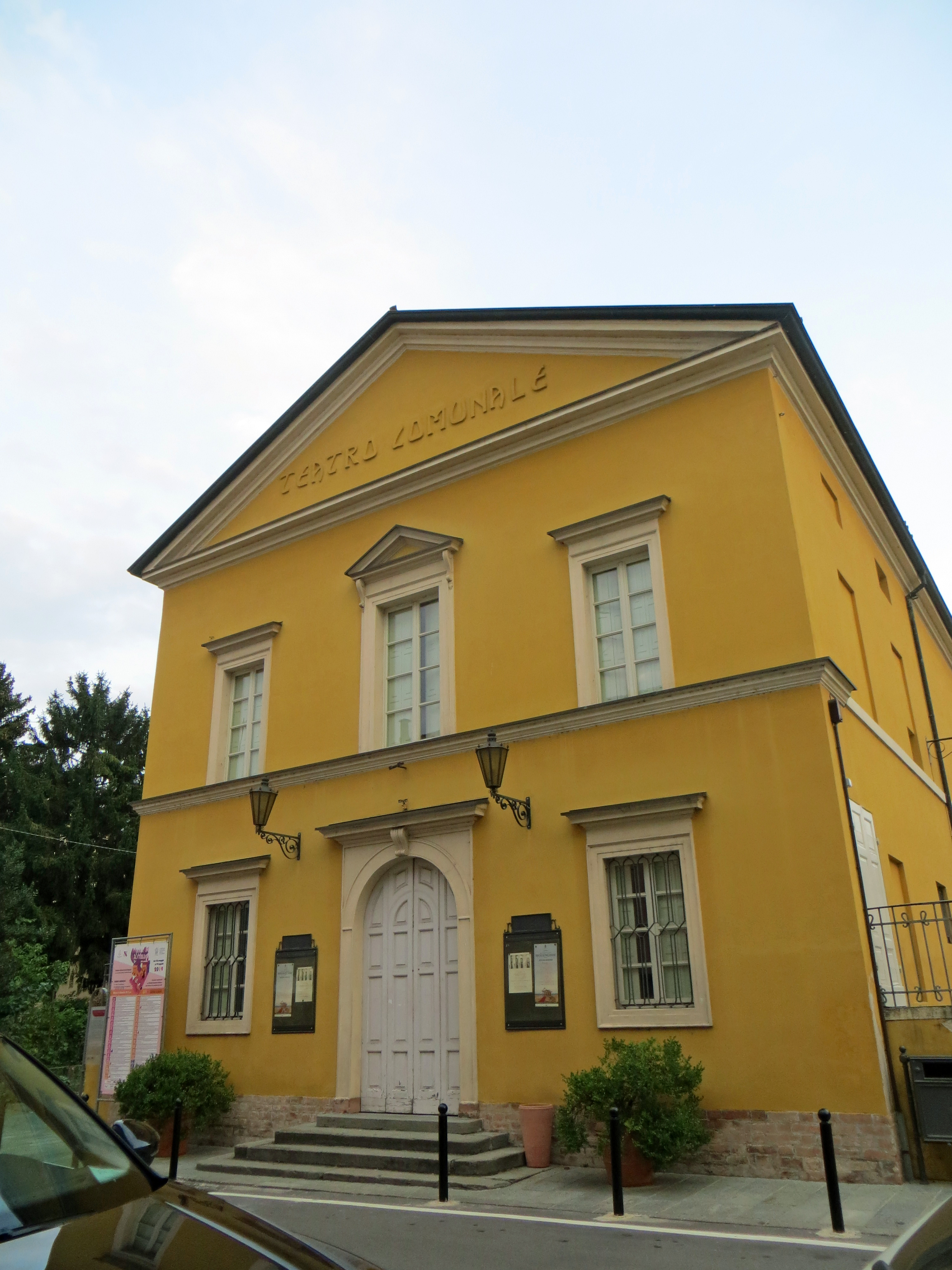 Teatro comunale (Fontanellato) - facciata